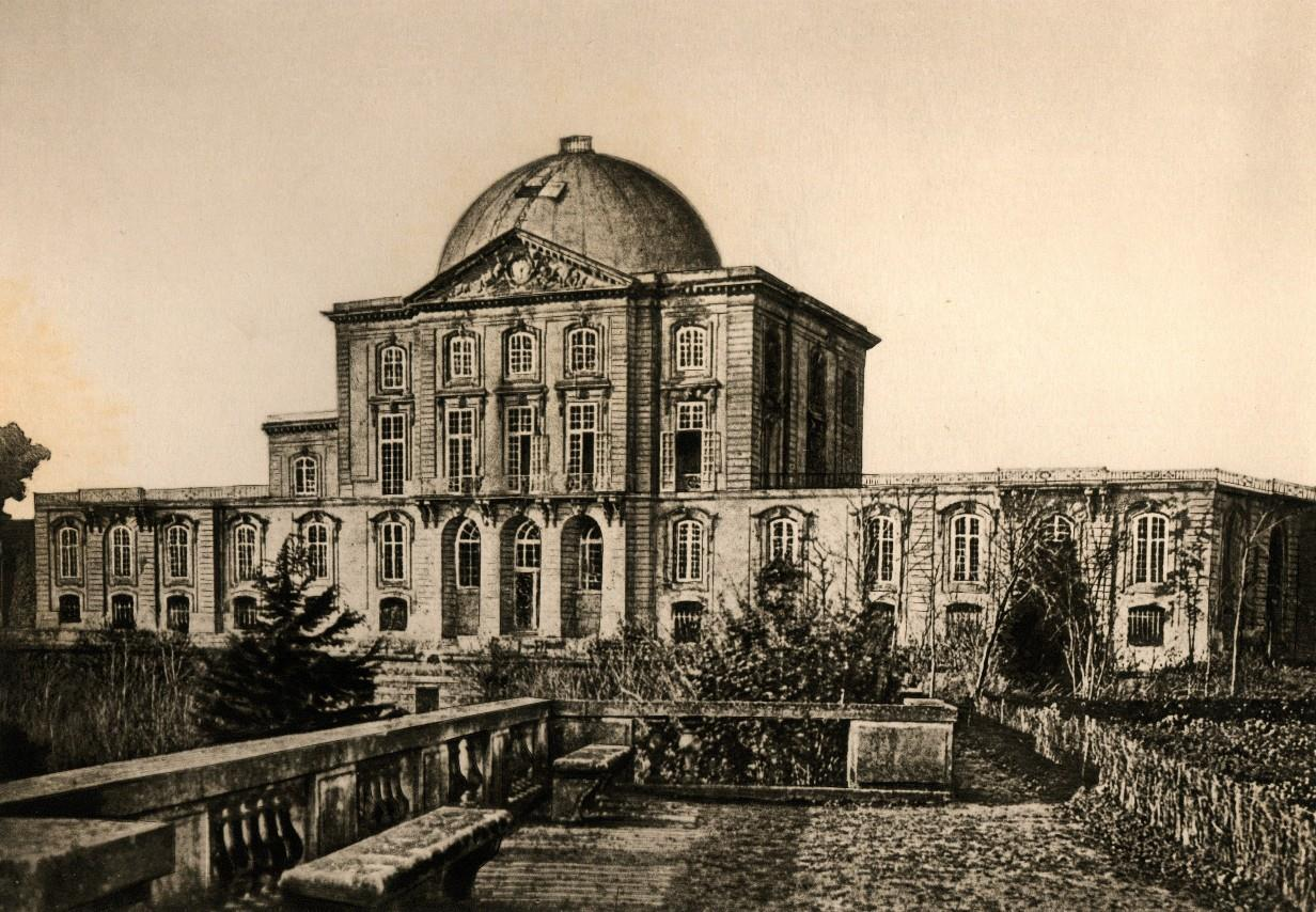 Projet non réalisé d'installation d'un dôme au sein du Château-Neuf, pour installer la lunette astronomique. Obs. de Paris.